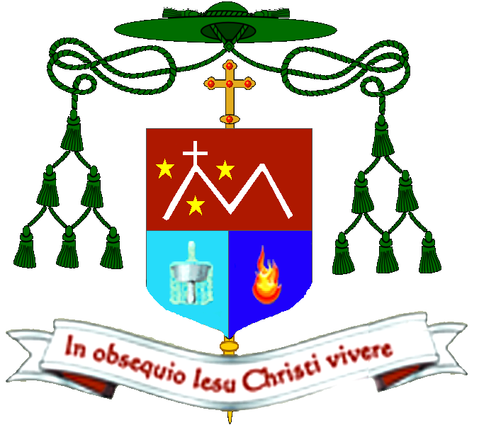 Escudo de Monseñor Castor Oswaldo Azuaje Pérez. Obispo de la Diócesis de Trujillo